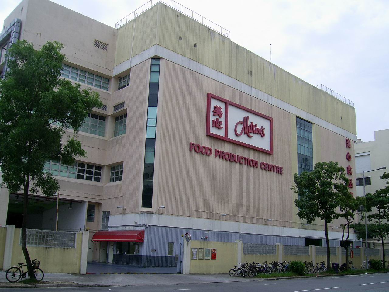 大埔工業園美心食品廠